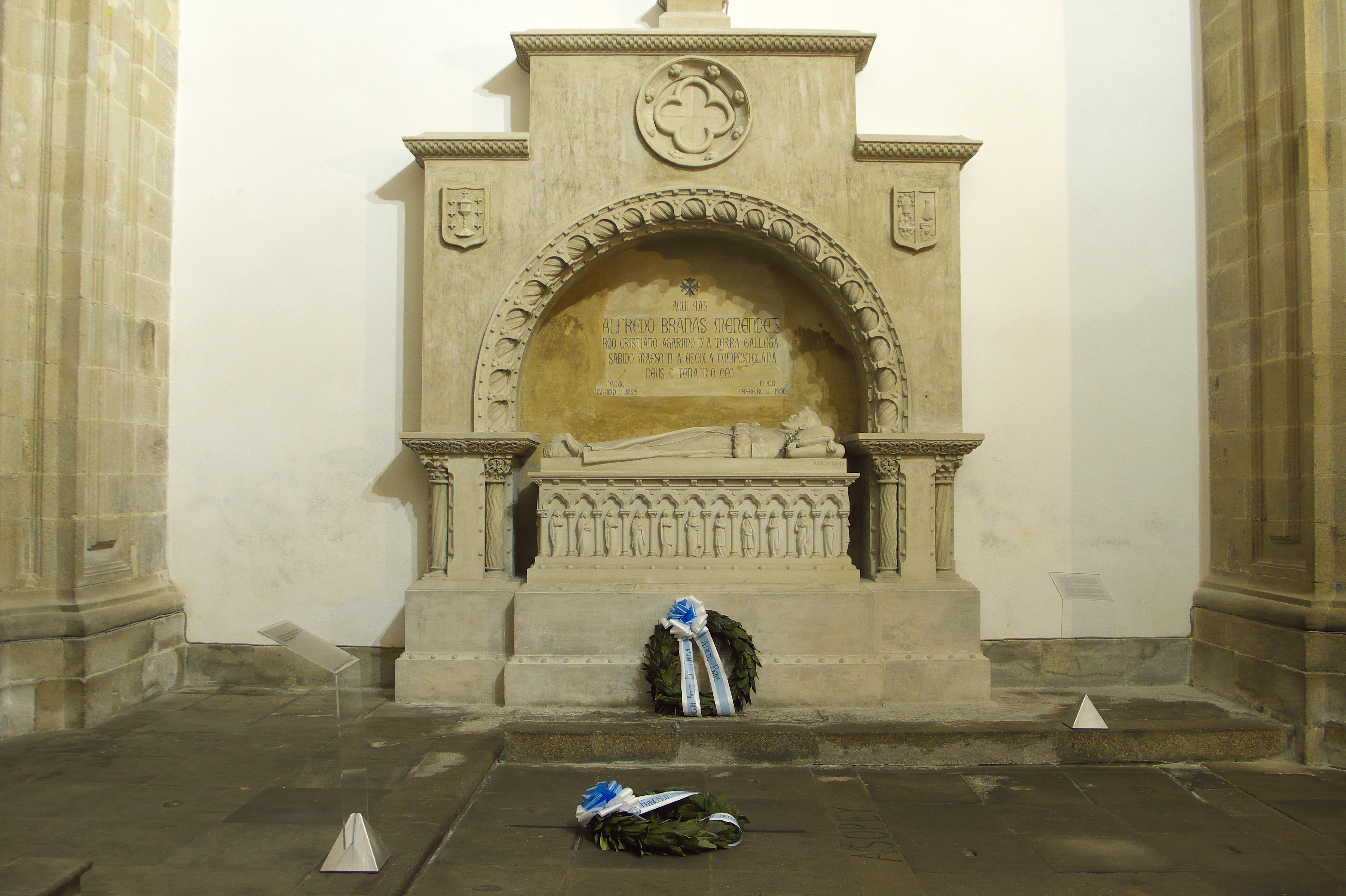 Panteón de Gallegos Ilustres, Convento de Santo Domingo de Bonaval (Santiago de Compostela).